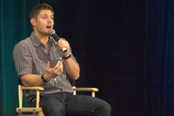 jensen006